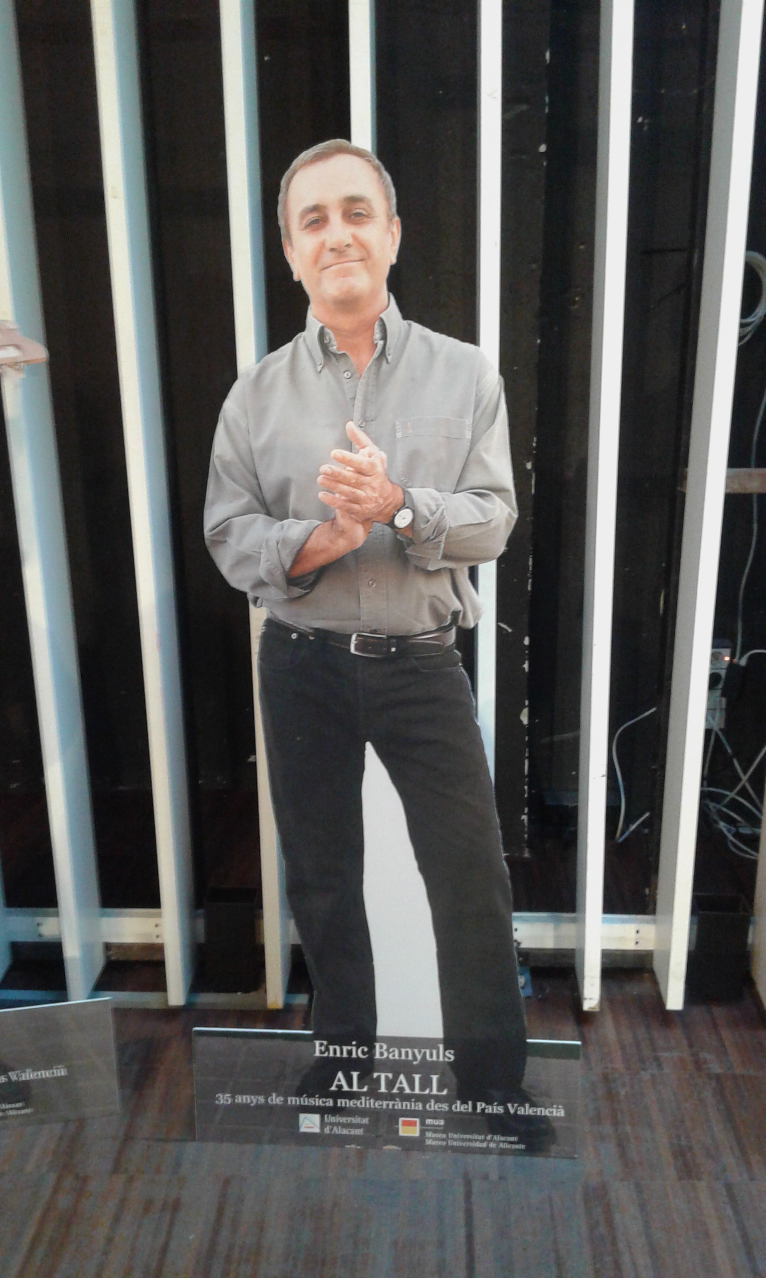 Enric Banyuls d'Al Tall